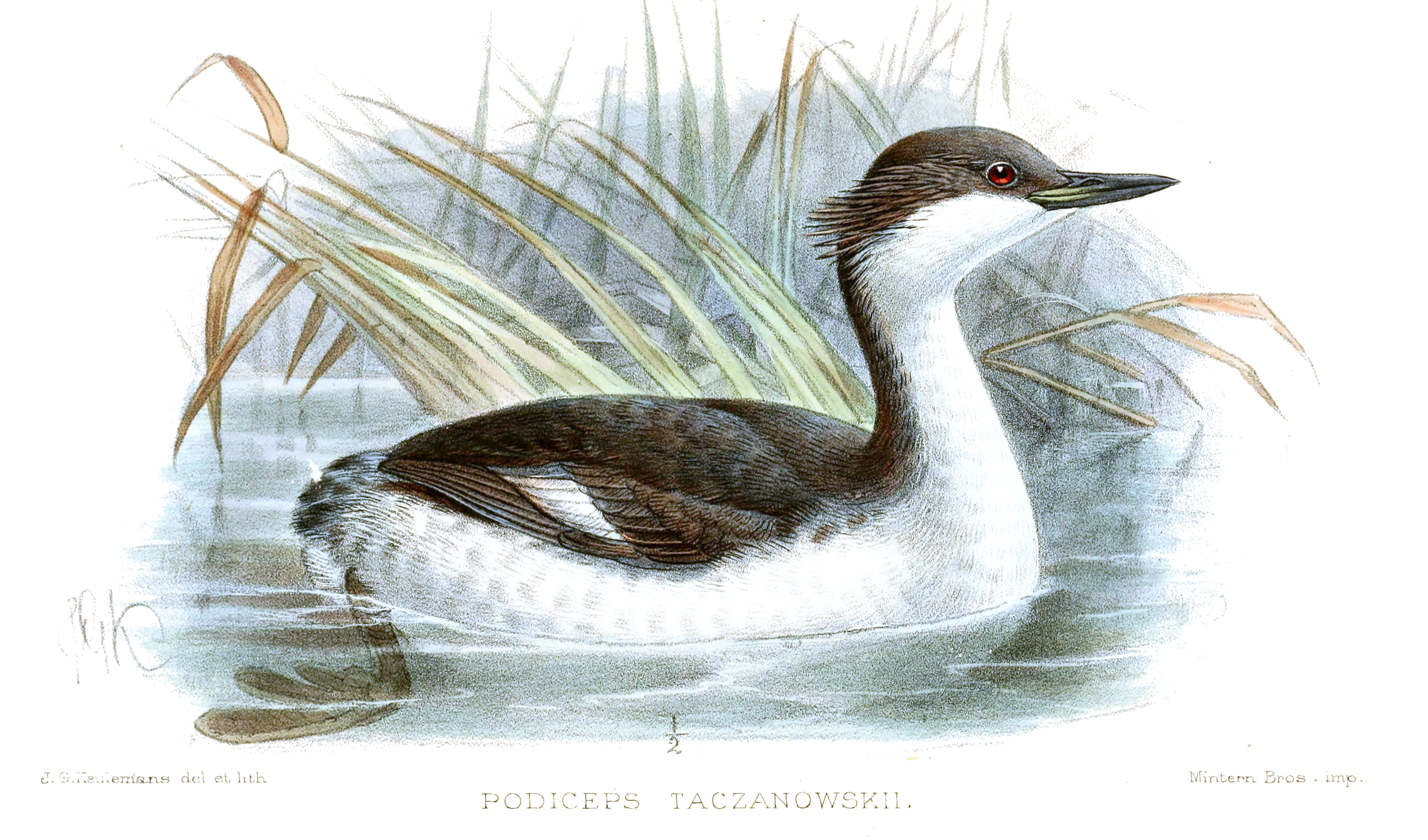 Podiceps taczanowski